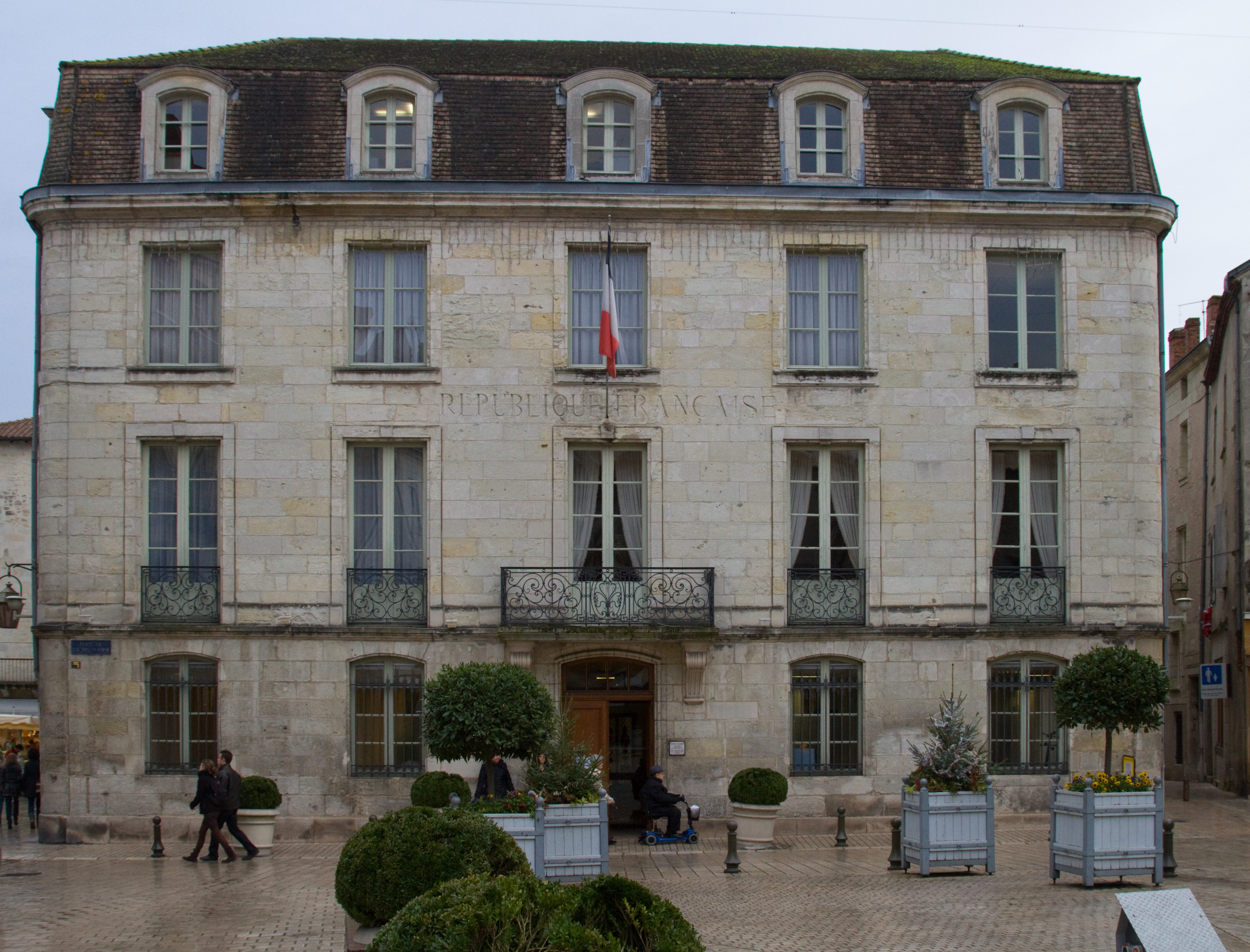 L'hôtel de Lagrange-Chancel, ancien hôtel de ville (jusqu'en mai 2013) de Périgueux, Dordogne, France.